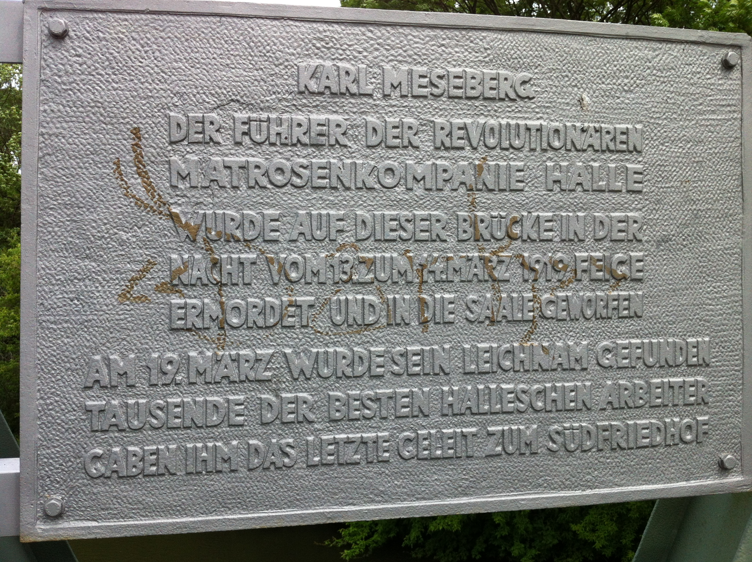 Gedenktafel für Karl Meseberg an der Hafenbahnbrücke in Halle (Saale)